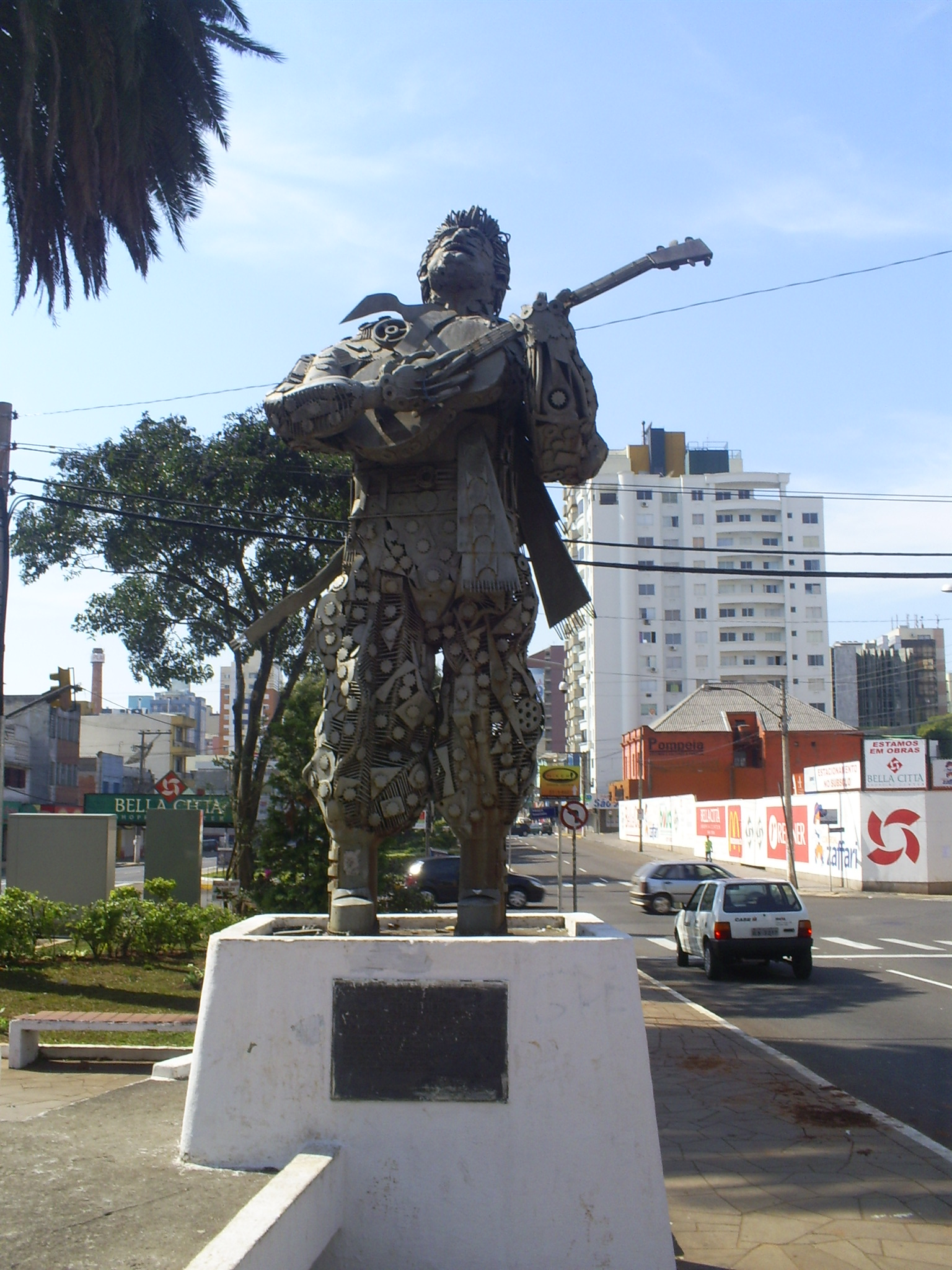 Estátua do compositor Teixeirinha, em Passo Fundo, Rio Grande do Sul